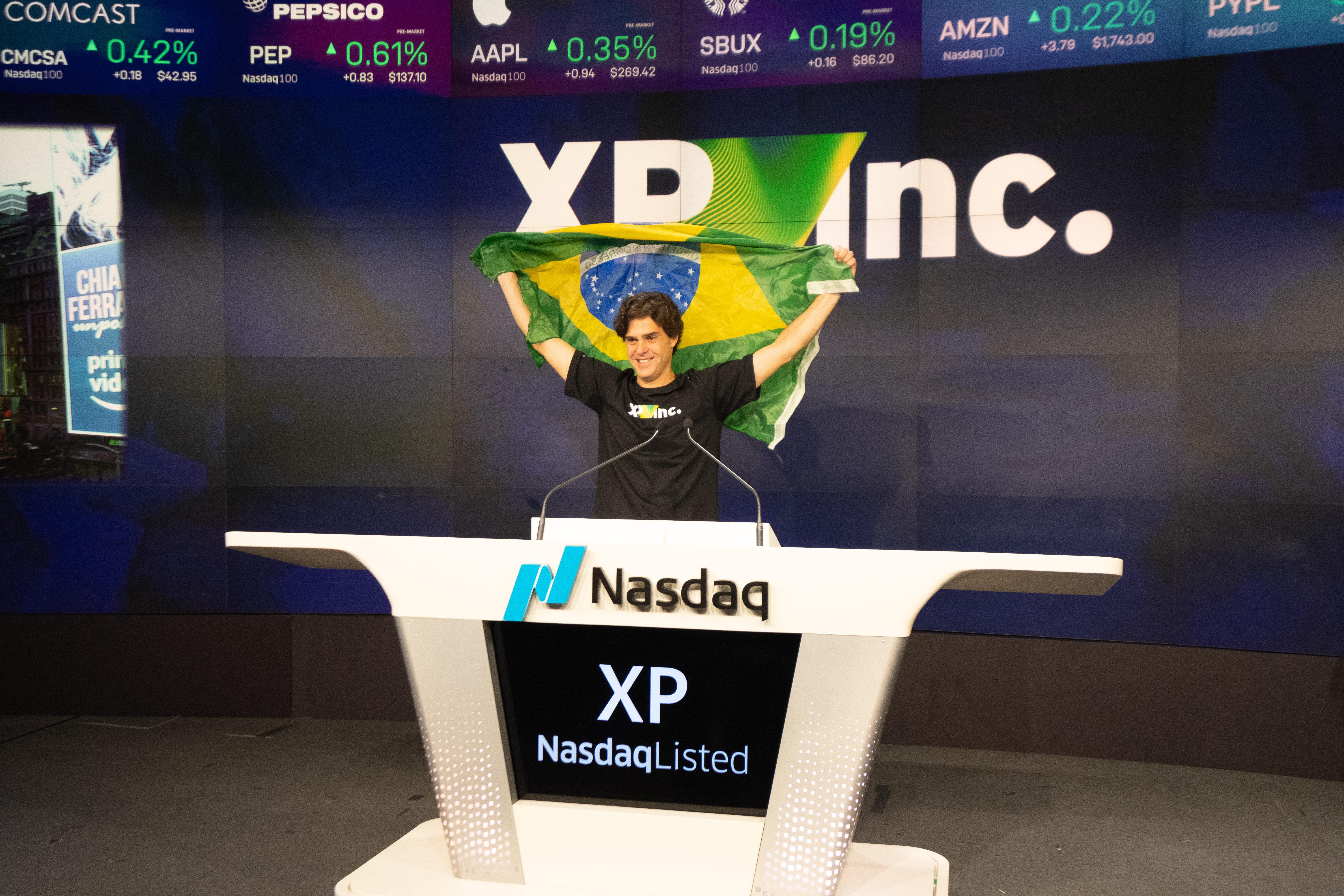 Guilherme Benchimol em cerimônia do IPO da XP na Nasdaq